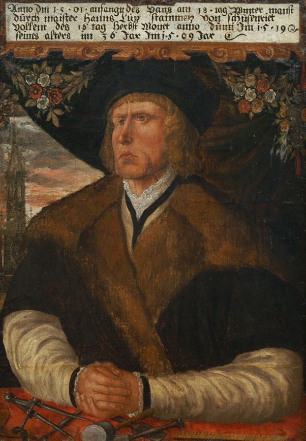 Hans Lutz, Steinmetz aus Schussenried (* um 1473 in Schussenried, † 1525; kam 1499 als Parlier nach Bozen)